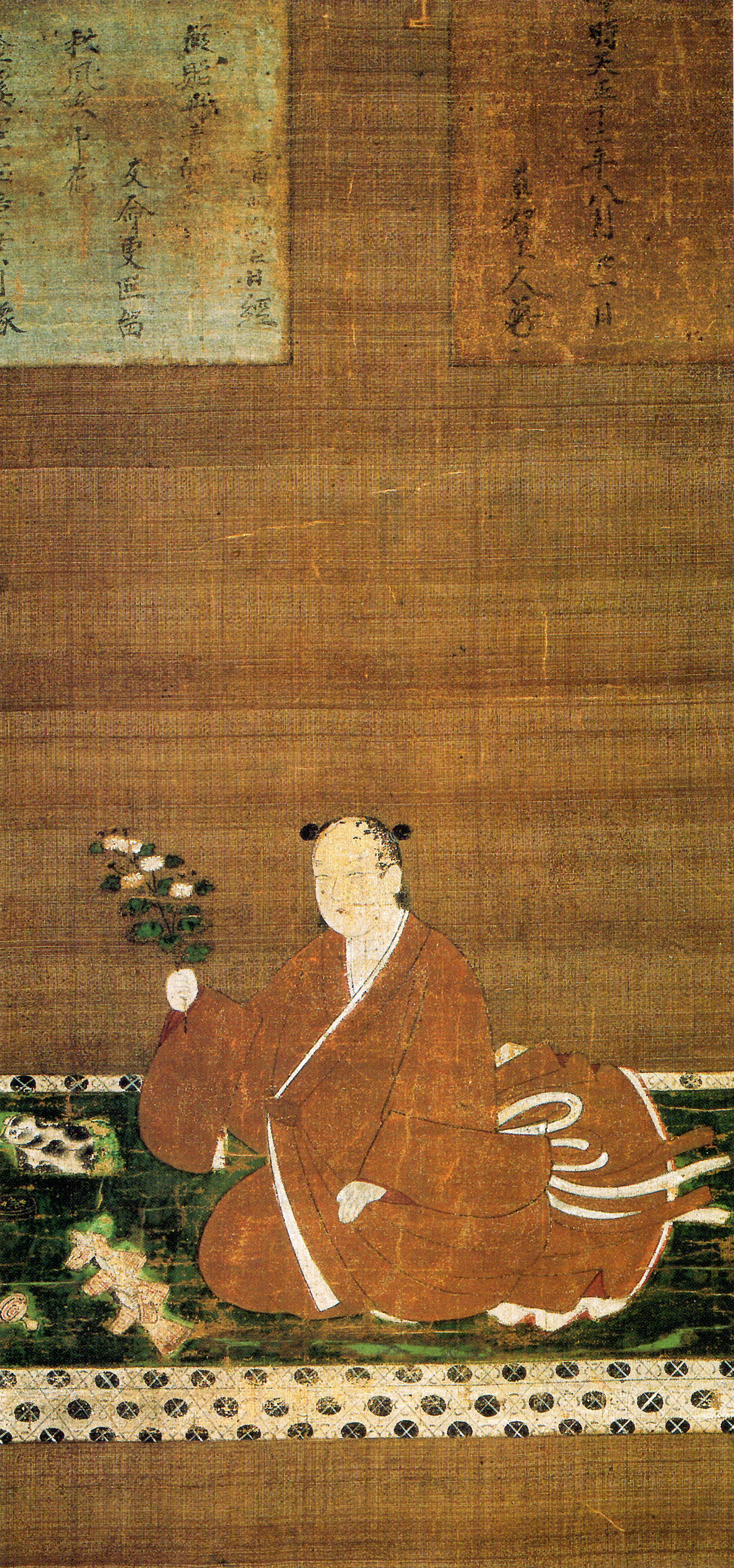 前田菊姫の肖像。